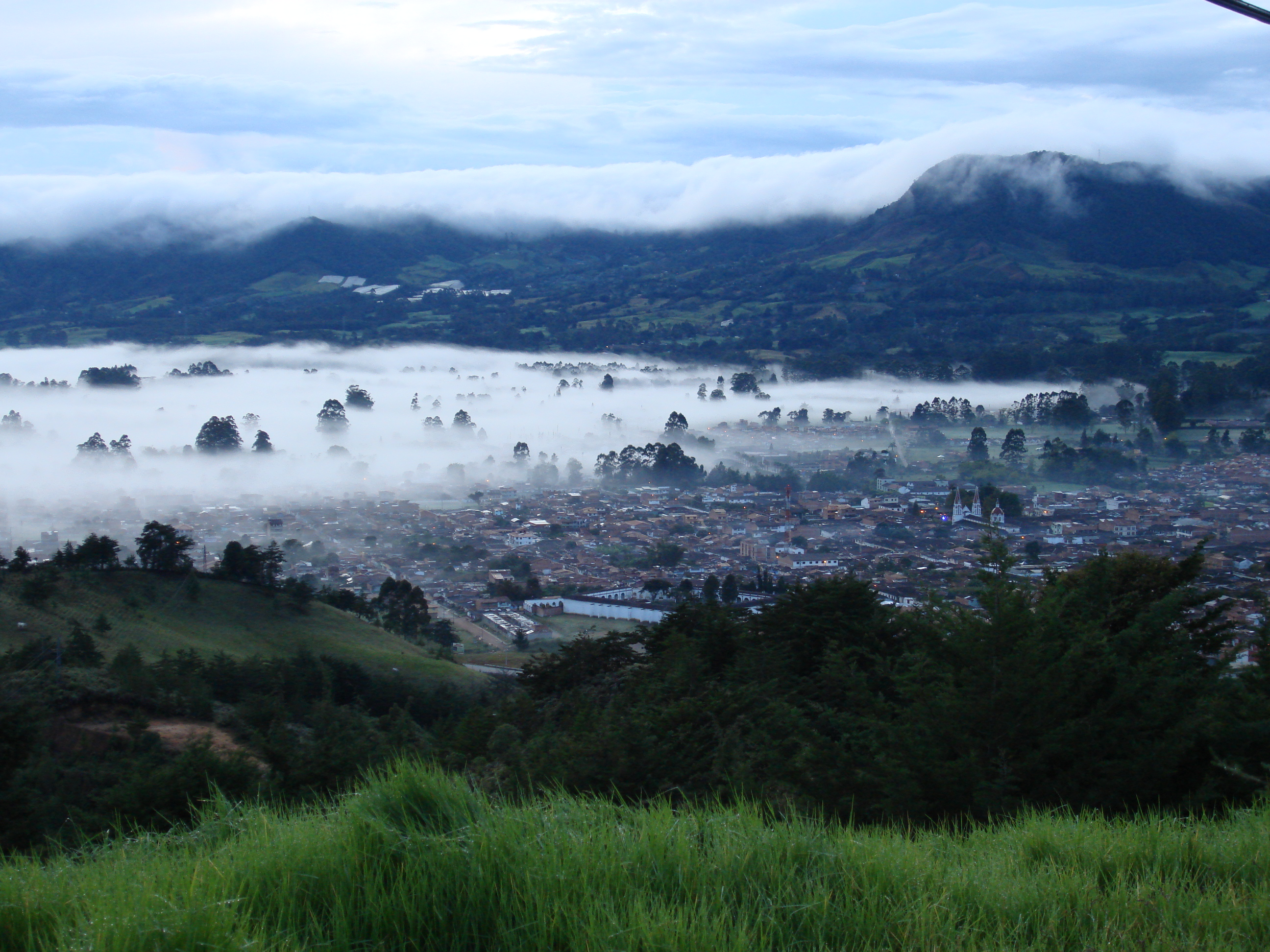 amanecer La Ceja Antioquia